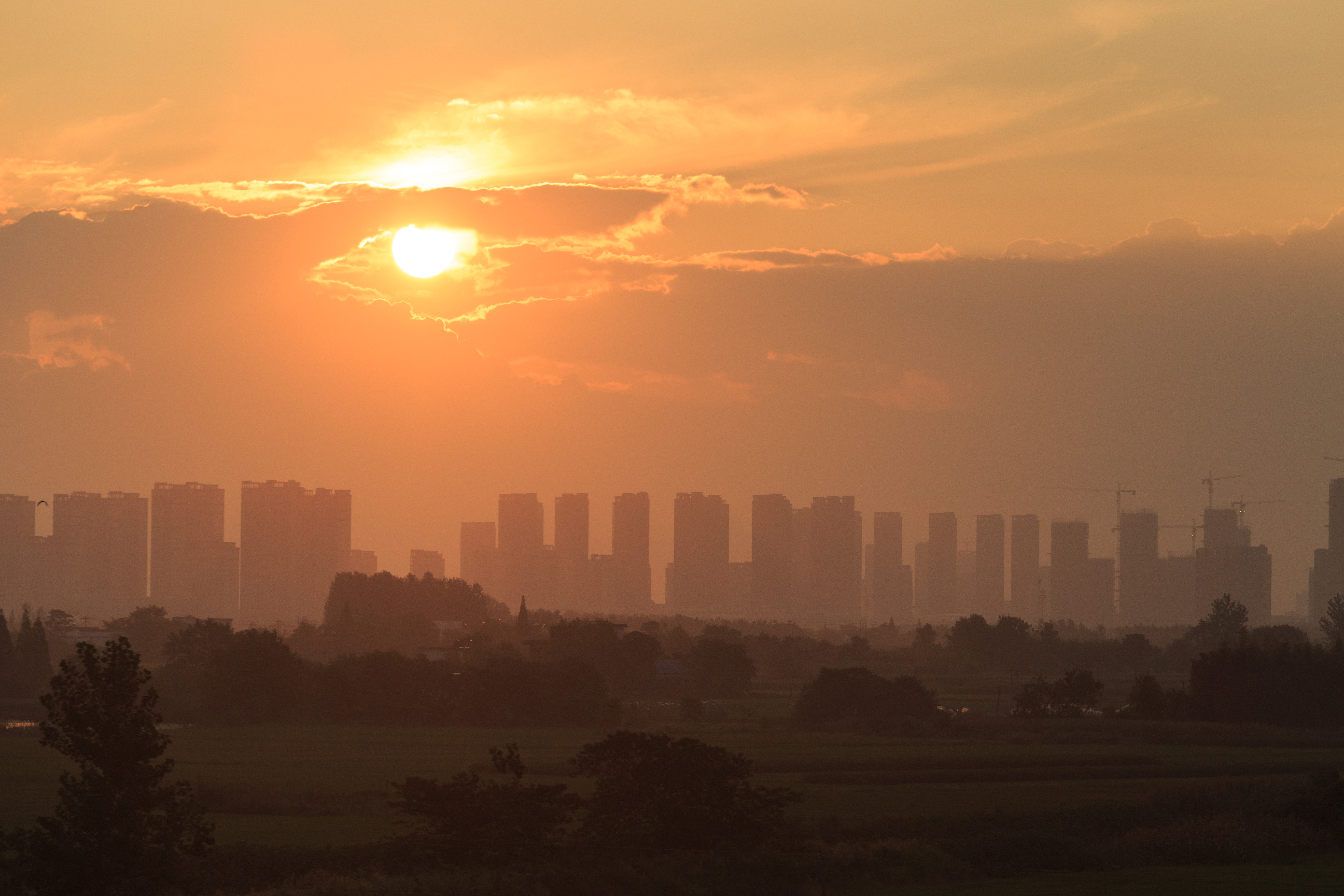 合福客运专线上远眺无为县新城区